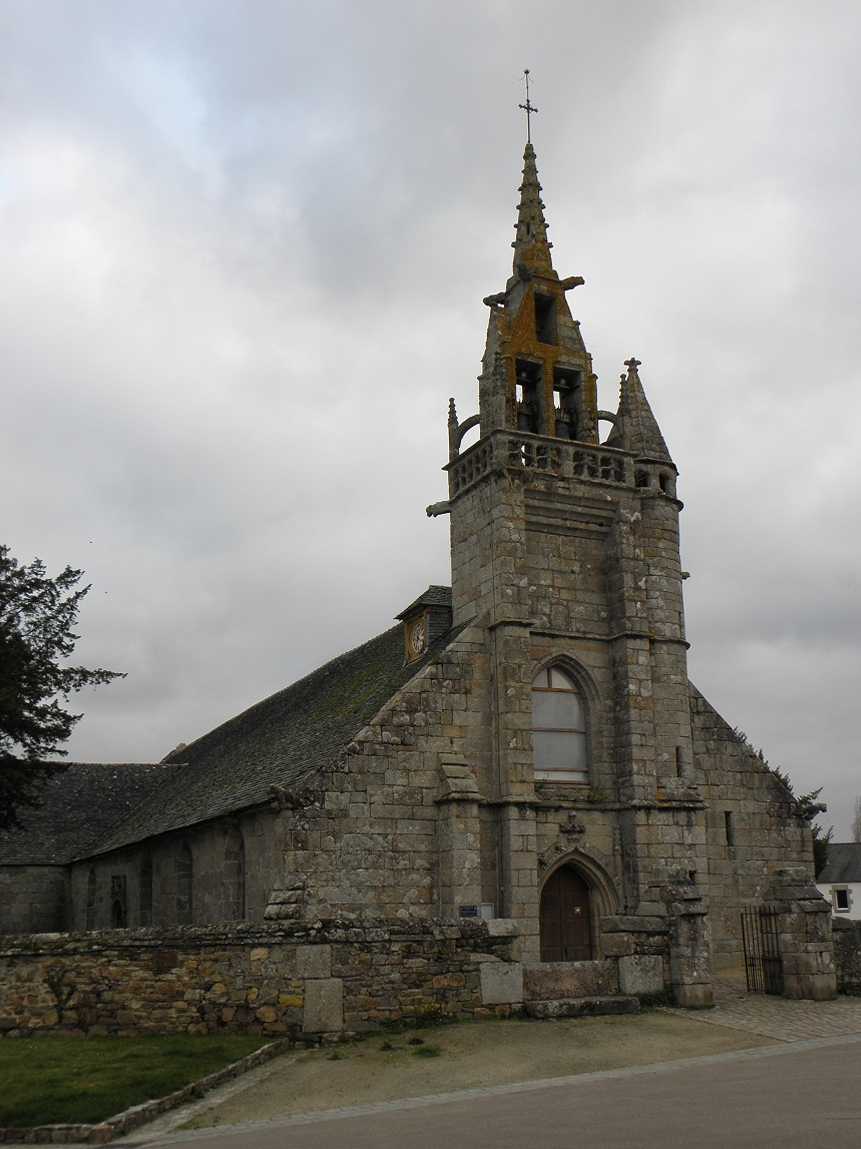 Façade occidentale de l'église Saint-Agapit à Plouégat-Guérand (29).